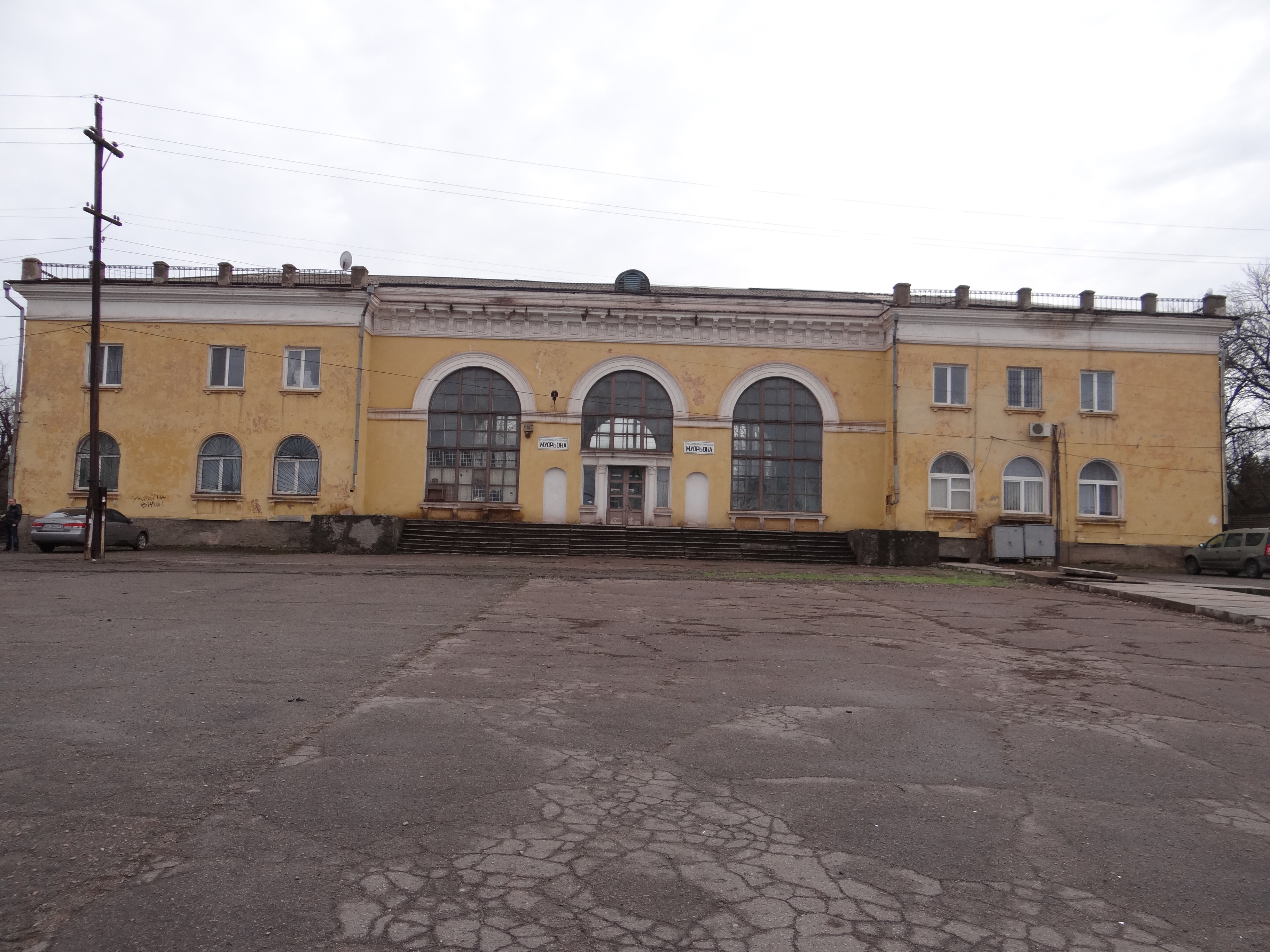 Станція Мудрьона. Вид із міста